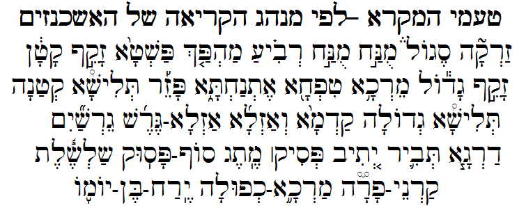 (טעמי המקרא לפי מנהג הקריאה של האשכנזים) Cantillation created by he:משתמש:נריה הרואה